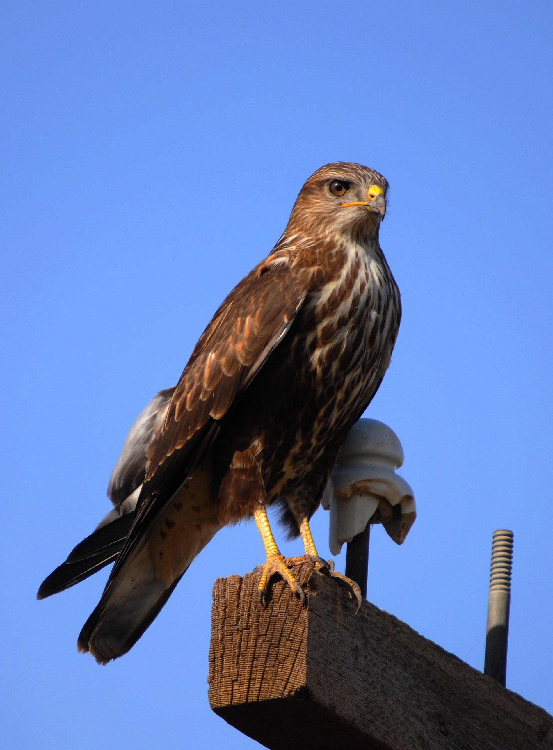 Kurdî: Li Koşkê hatiye kişandin.